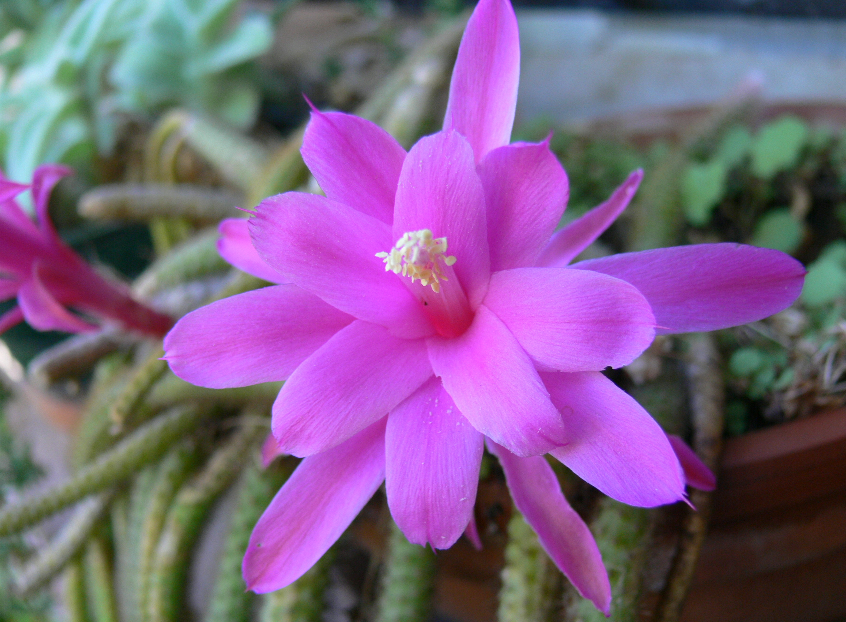 Fleur de Disocactus flagelliformis (anciennement Aporocactus flagelliformis), dit aussi « cactus queue-de-rat ». France, 2006. Auteurs Jodelet / Lépinay